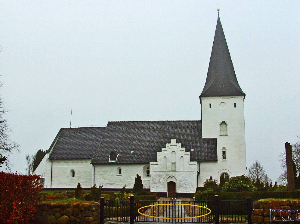 fra nord